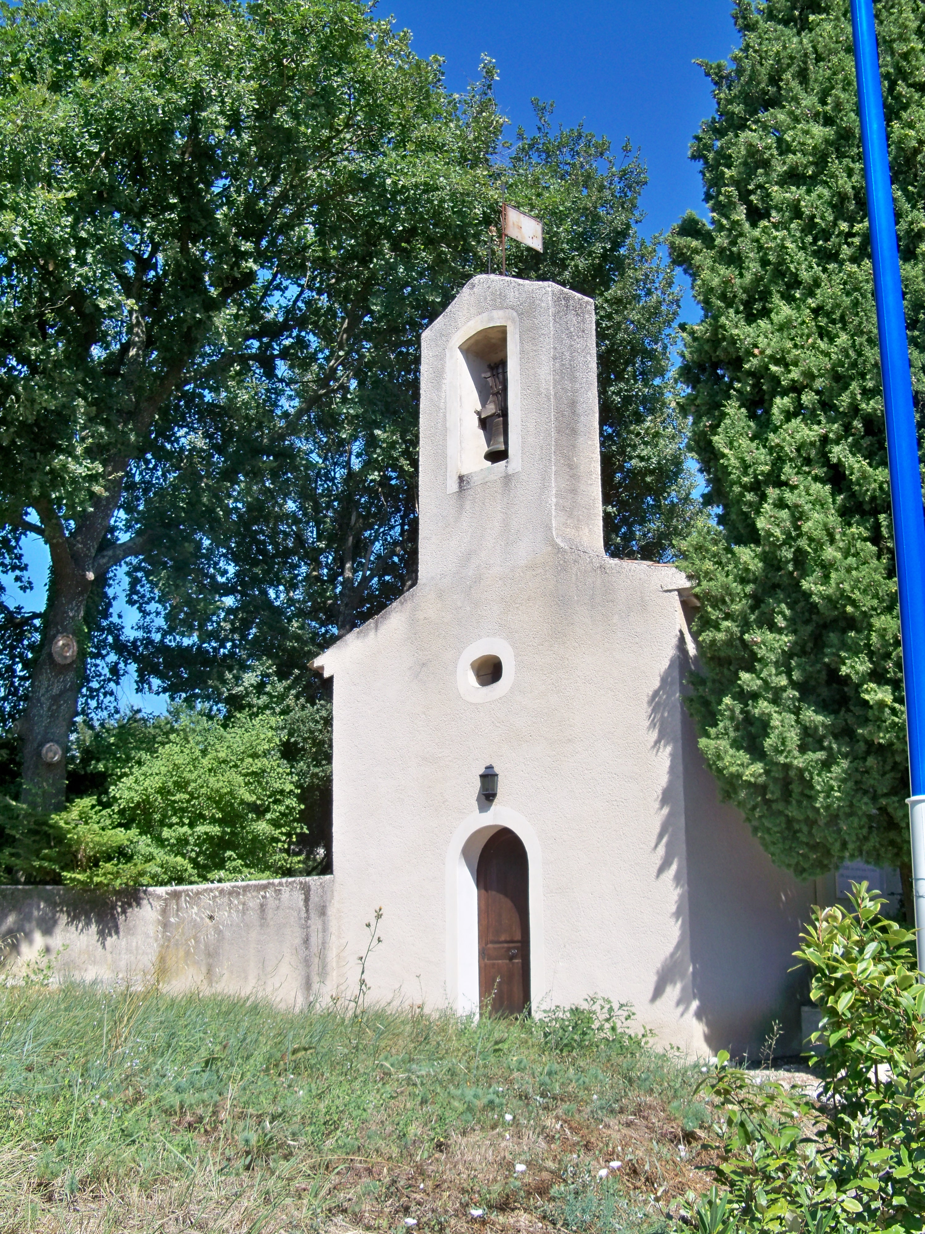 Chapelle à Saint Marcellin lès Vaison, Vaucluse, France